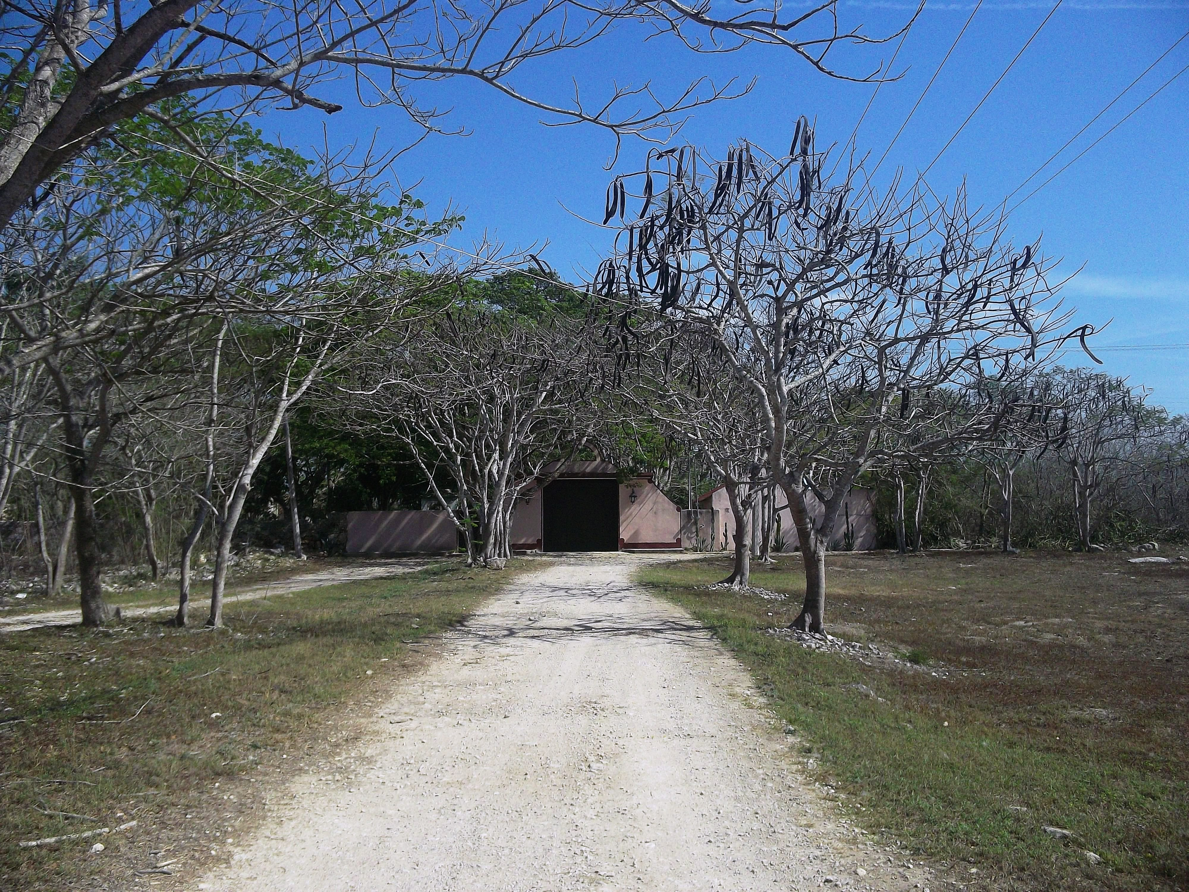 Hacienda San José Kuché, Yucatán.